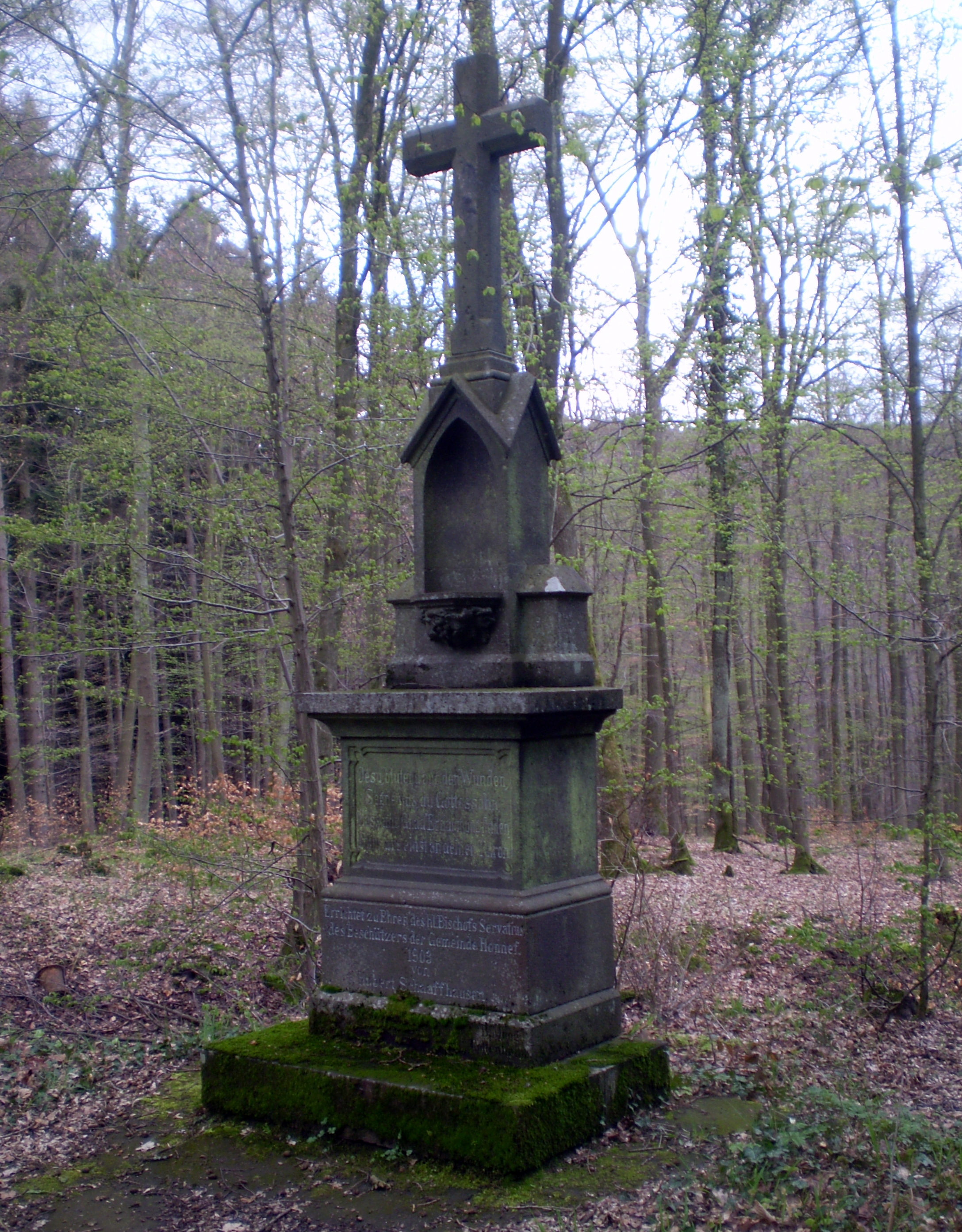 Schaaffhausenkreuz am Mucherwiesenweg, Bad Honnef